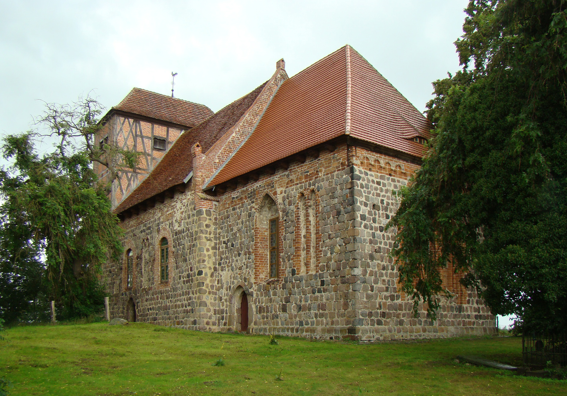 Dorfkirche in Vielist. Foto: Peter Schmelzle 2011